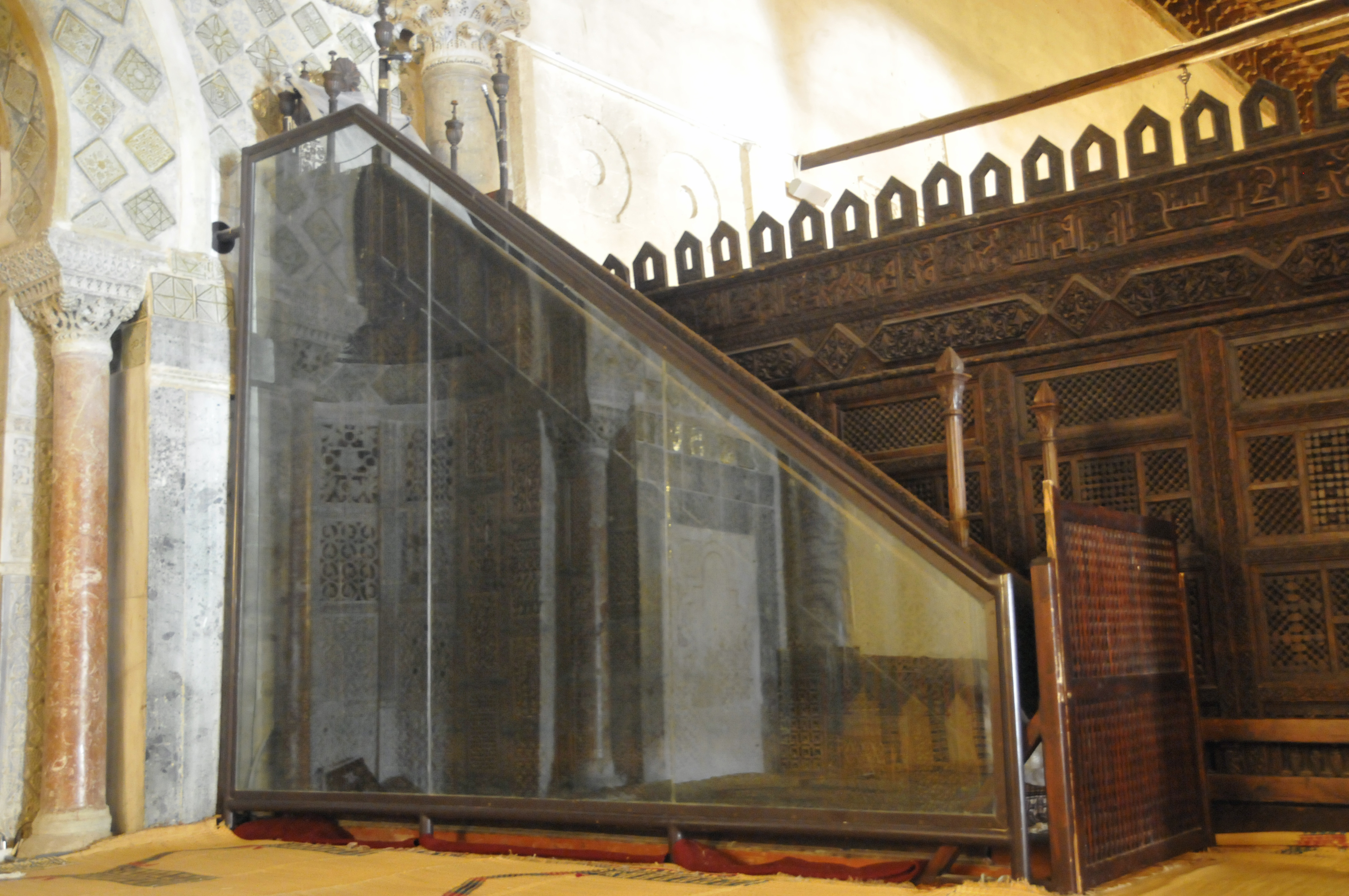 Le Minbar de la grande mosquée de Kairouan. Le minbar est protégé par un panneau en verre ainsi que d'un voile sur sa partie intérieure (l'escalier). Ceci afin de proteger ce chef d'oeuvre, en bois sculpté, de toute dégradation. A coté du minbar, on peut voir un des cotés de la maqsoura.